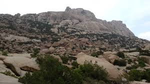 الجبل الابيض ( ابراهيم )